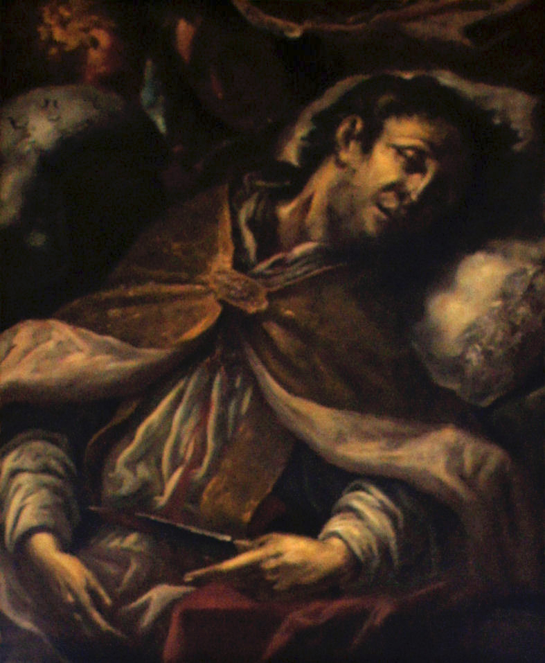 Porträtgemälde von Konrad V. von Hebenstreit, Fürstbischof von Freising, im Fürstengang zwischen Fürstbischöflicher Residenz und Freisinger Dom.